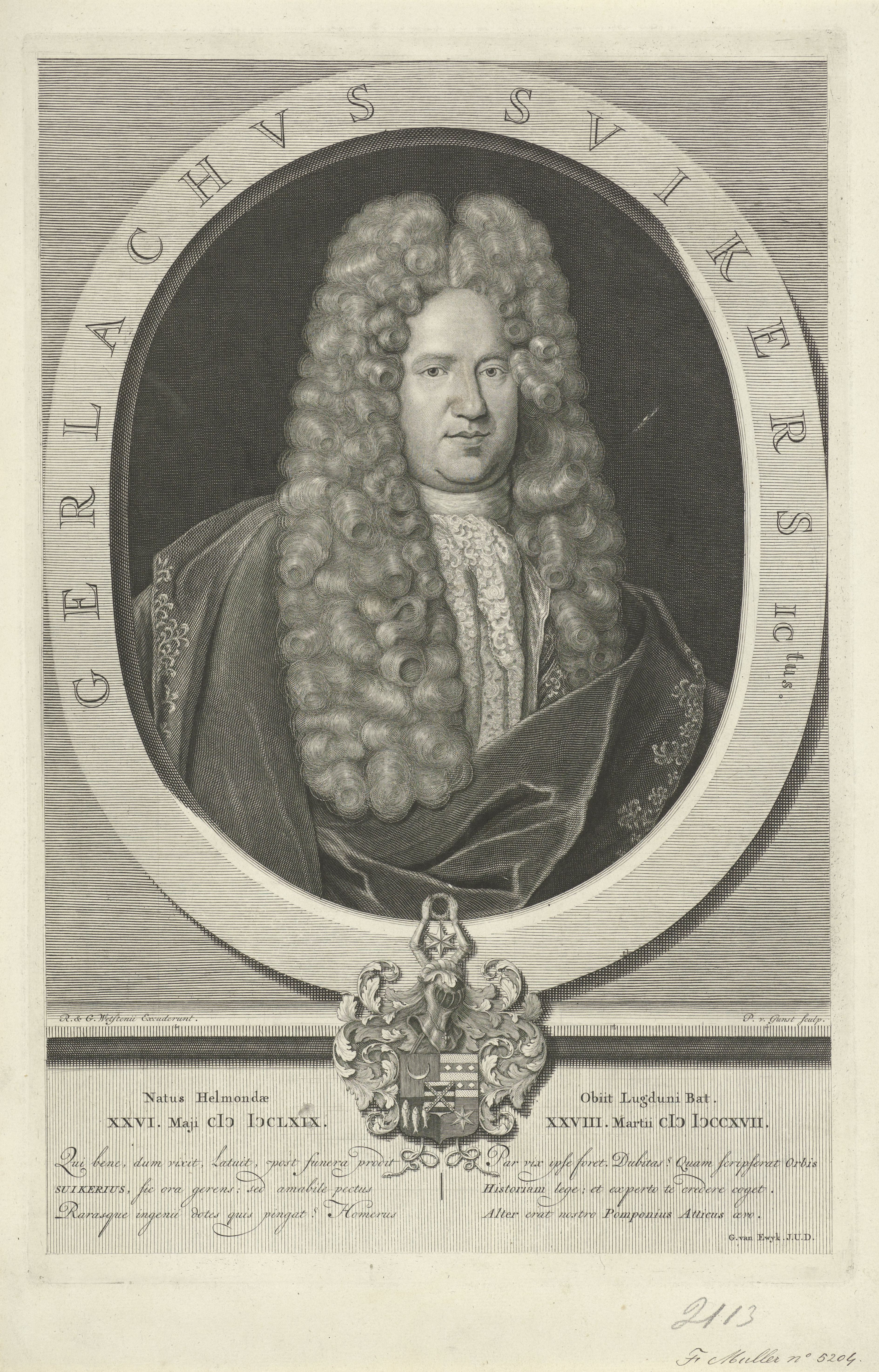 IdentificatieTitel(s): Portret van Geerlof SuikersObjecttype: prent Objectnummer: RP-P-1937-844Catalogusreferentie: FMP 5204Collectie Rijksmuseum-2(2)Opmerking: 2(2) aan de hand van aanwezige staten RijksmuseumOpschriften / Merken: verzamelaarsmerk, verso midden onder, gestempeld: Lugt 2228onderschrift, recto rechtsonder, geshrreven: ‘Fr. Muller n. 5204’Omschrijving: Geerlof Suikers, Nederlands historicus en letterkundige. Onder het portret een wapenschild. De prent heeft een Latijns onderschrift.VervaardigingVervaardiger: prentmaker: Pieter van Gunst (vermeld op object)schrijver: G. van Ewyk (vermeld op object)uitgever: Rudolph & Gerard Wetstein (vermeld op object)Plaats vervaardiging: AmsterdamDatering: 1717 - 1731Fysieke kenmerken: gravure en etsMateriaal: papier Techniek: graveren (drukprocedé) / etsenAfmetingen: plaatrand: h 357 mm × b 235 mmOnderwerpWie: Geerlof SuikersVerwerving en rechtenVerwerving: onbekendCopyright: Publiek domein